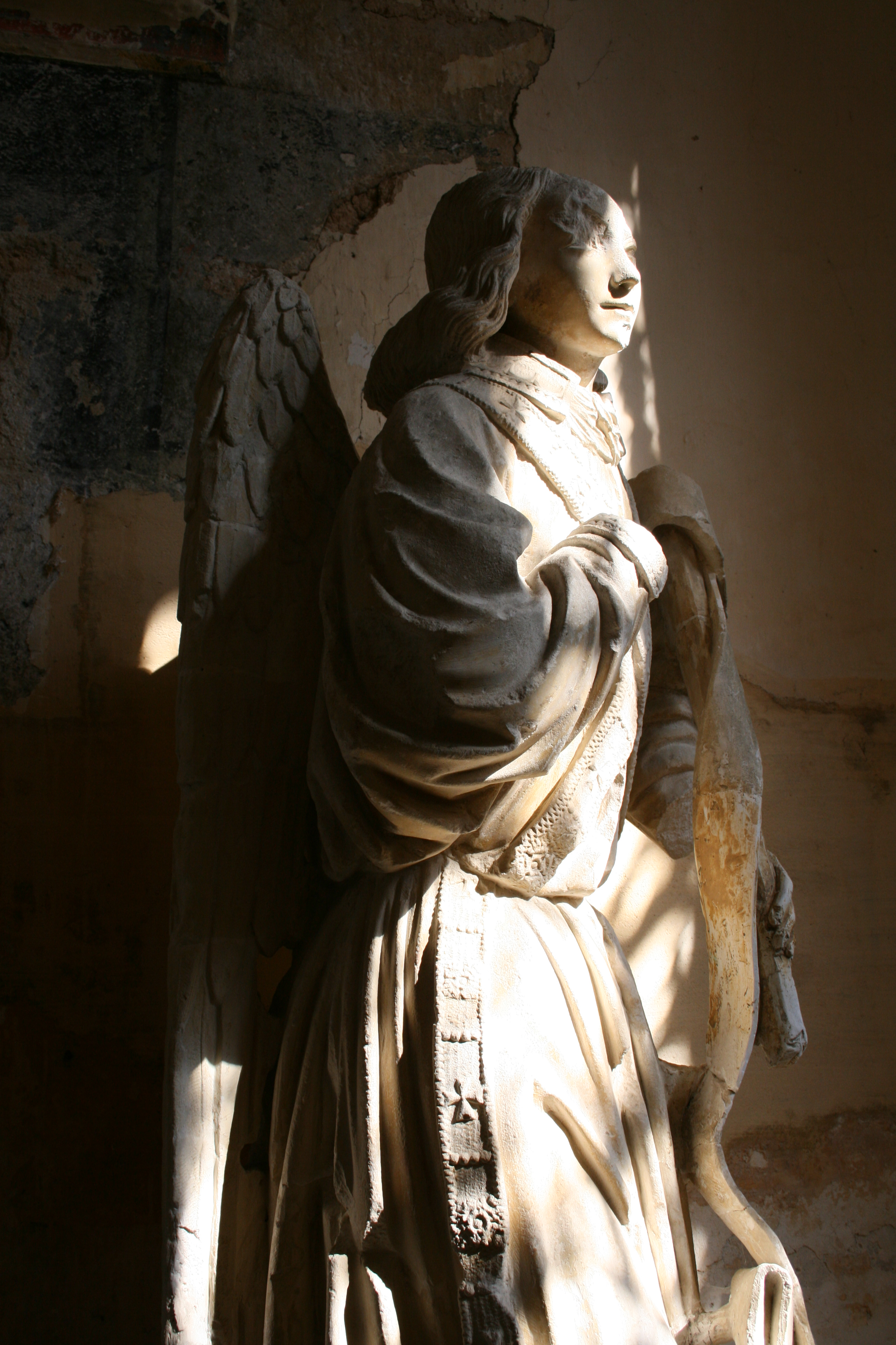 Eglise de Flavigny-sur-Ozerain Statuaire Ange de l'Annonciation XVe siècle